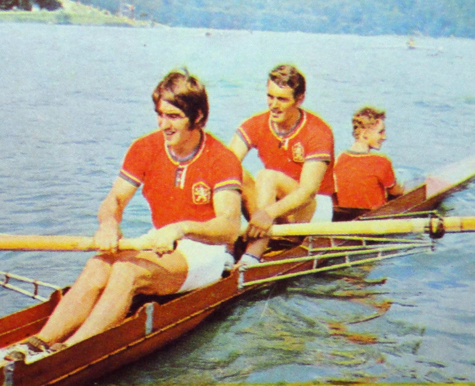 MUNCHEN 72-Figurina-Stickers-Panini-N° 154-CESKOSLOVENSKO CANOTTAGGIO recuperata